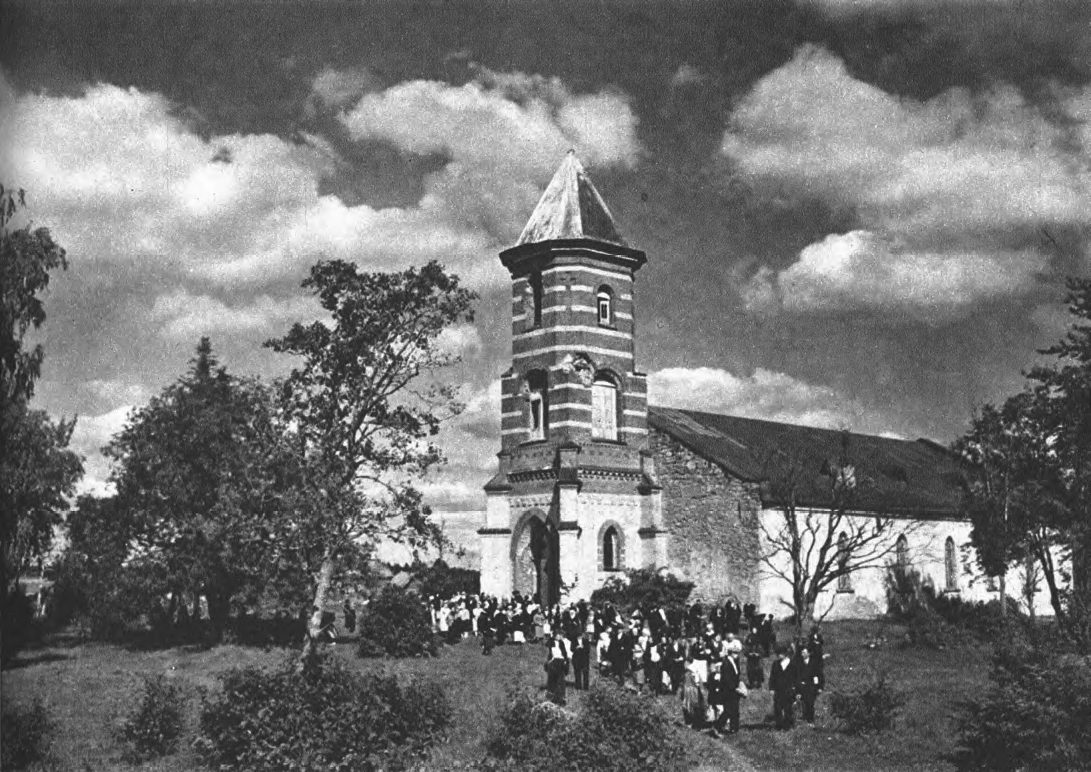 Богослужение в кирхе прихода Молосковица.